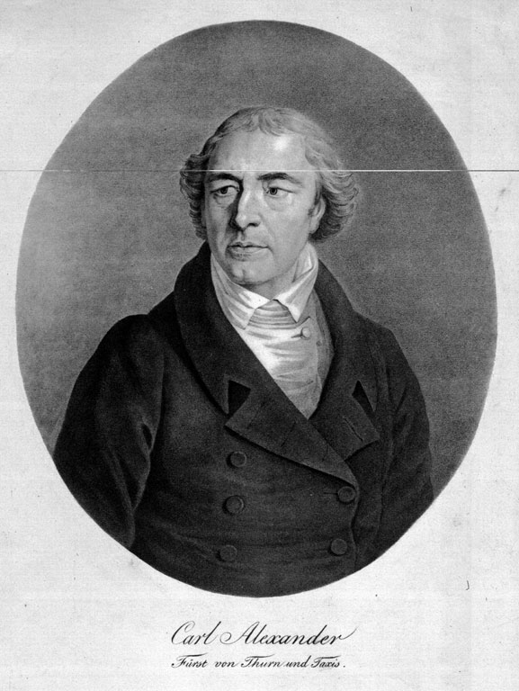 Karl Alexander von Thurn und Taxis (1805 - 1827)